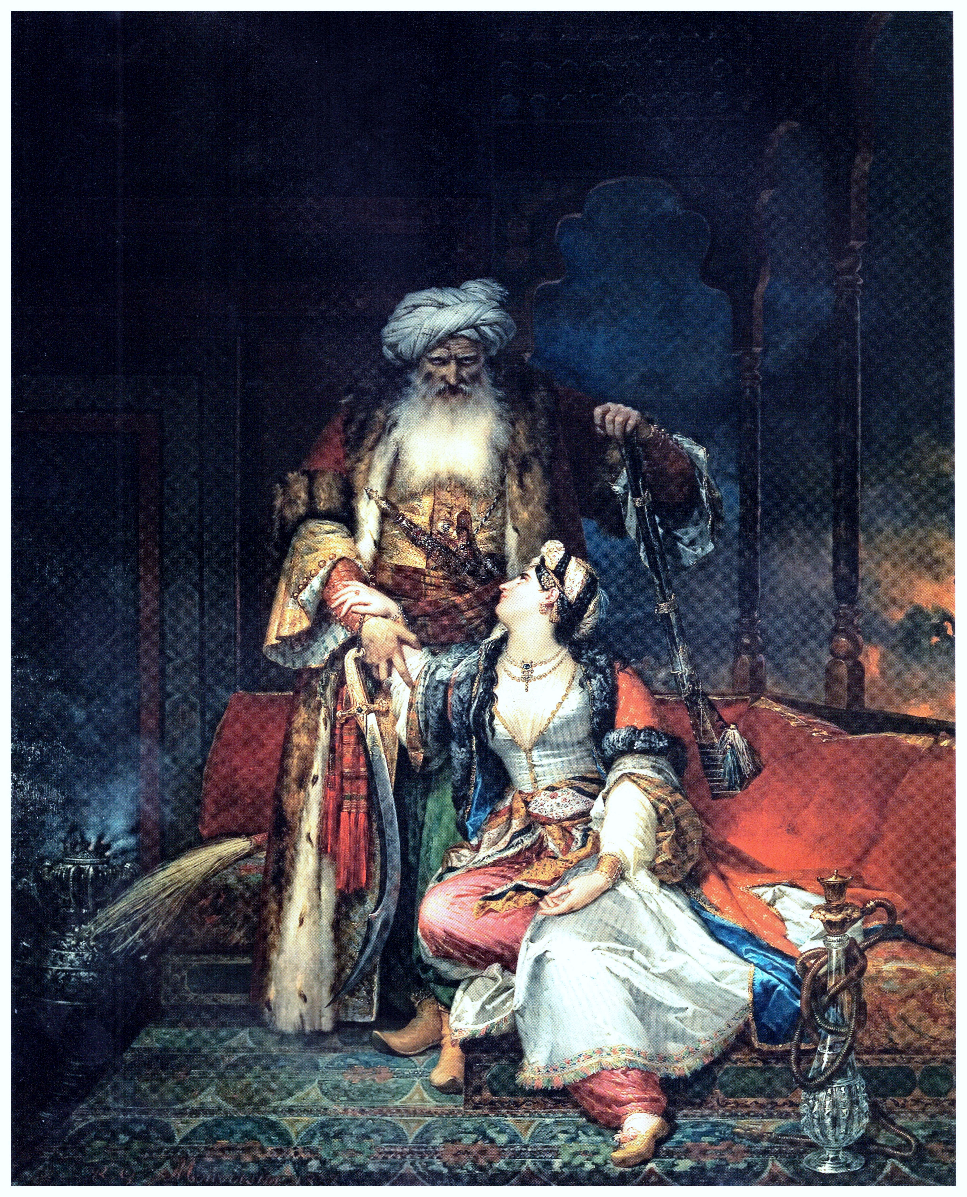 El albanés musulmán Alí Pashá de Yánina fue el gobernante de los Balcanes cuando estos formaban Rumelia, una provincia del imperio otomano; Kira (Kyra) Vasiliki, una griega y cristiana, era su esposa favorita.